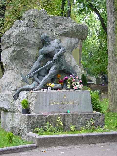 Grób Iwana Franko na Cmentarzu Łyczakowskim we Lwowie. Autor: Stanisław Kosiedowski, sierpień 2002.